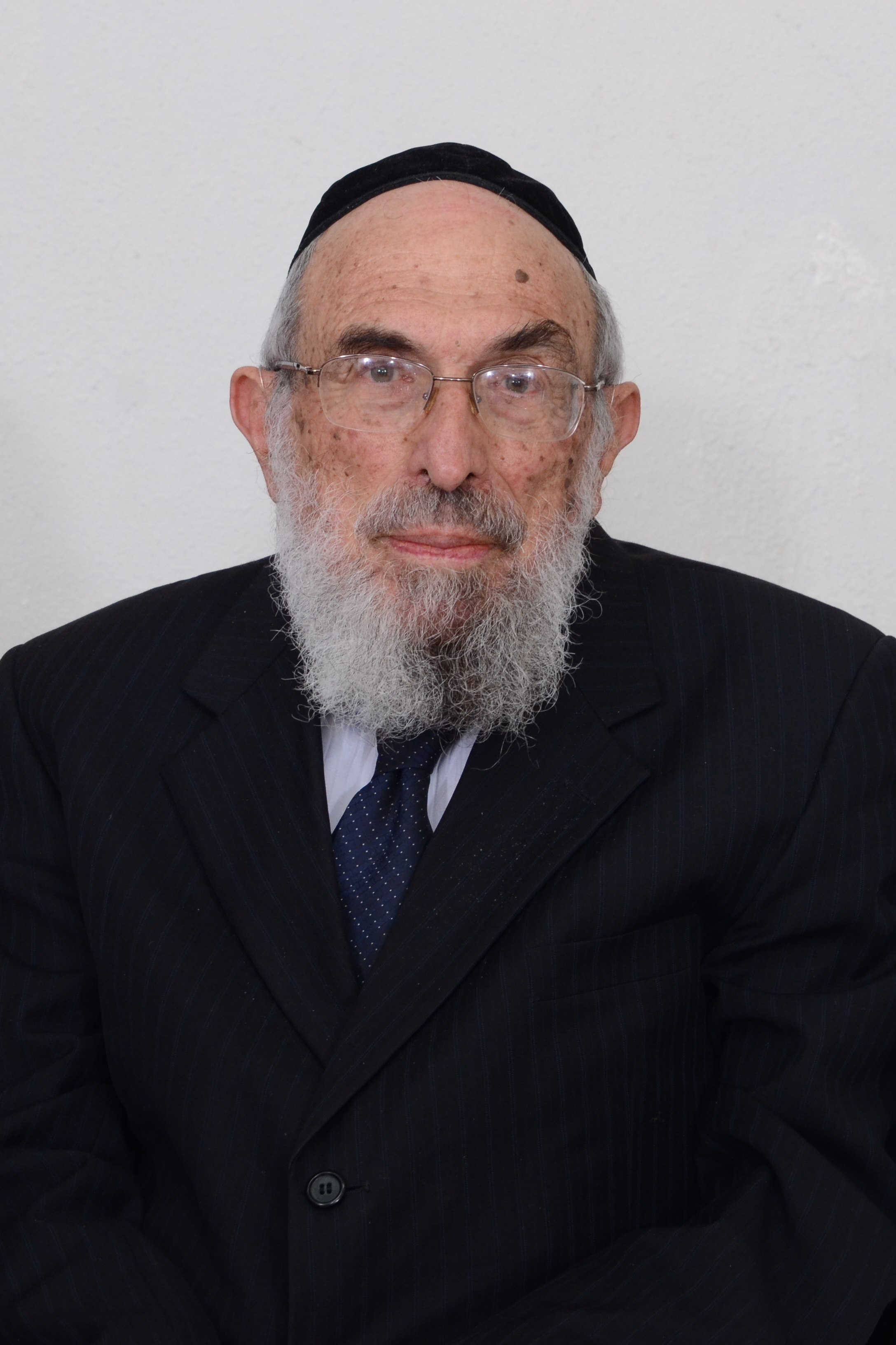 צבי (אפרים) וינברגר